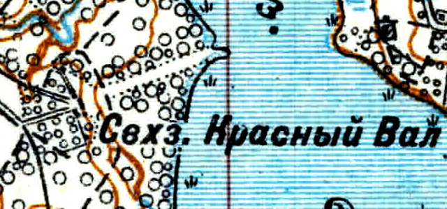 Топографическая карта Ленинградской области, квадрат Vc-29 (Батецкая), местечко Санаторий «Красный Вал»